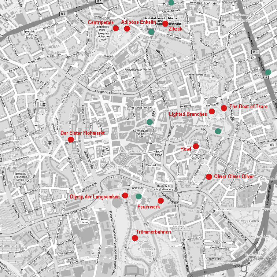 Die Projekte des Braunschweig Parcours 2004 in Braunschweig. Die türkisen Punkte weisen auf die Standorte des Projekts "Class of Jealous Dance" hin, das aus mehreren Teilprojekten besteht. Nicht im Plan vorhanden sind die Standorte Stadtpark und Franzsches Feld.